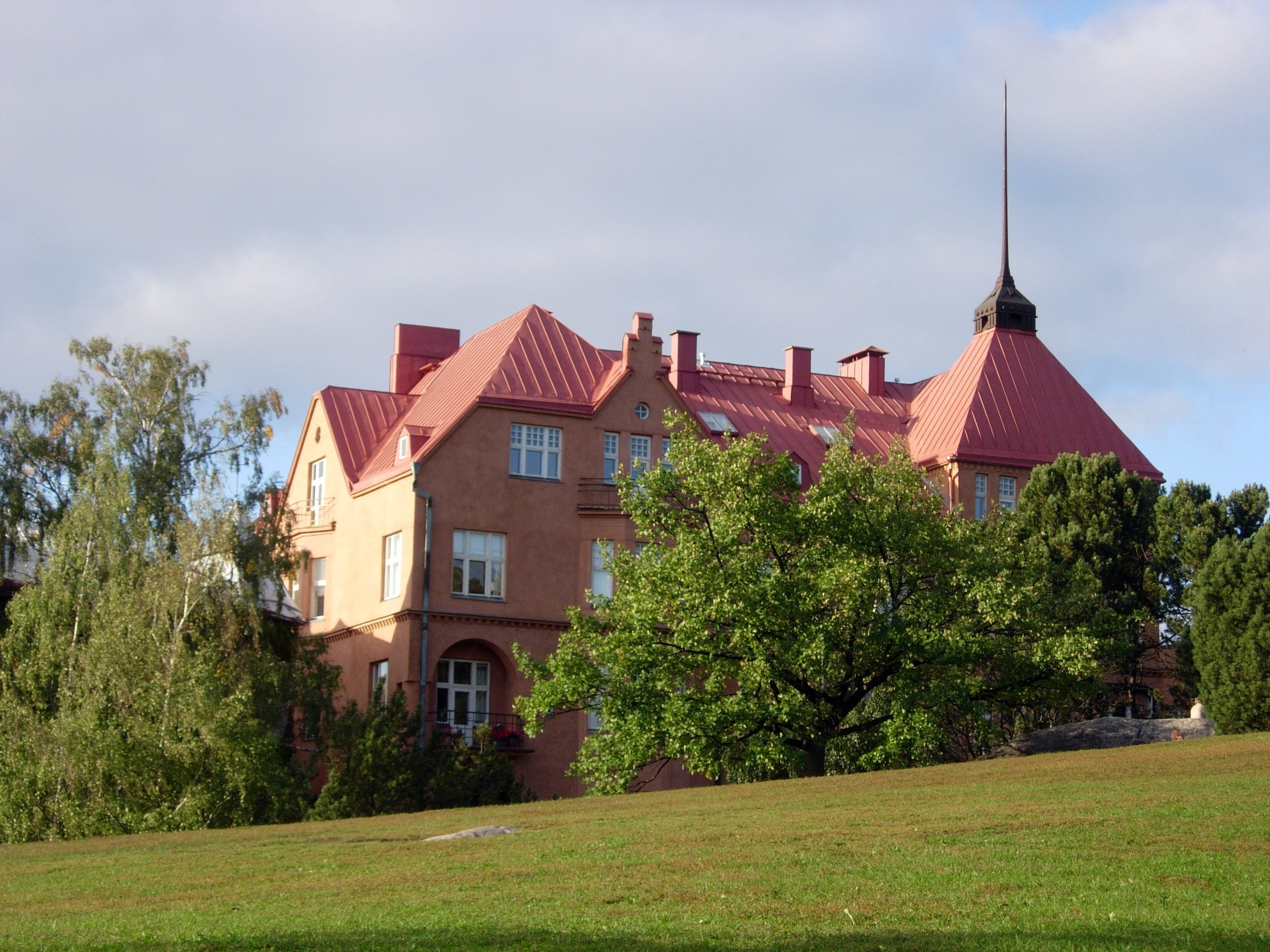 Puolalanpuiston laidalla oleva rakennus noin vuodelta 1901.